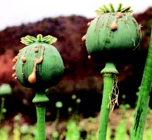 From: Opium poppy (Papaver somniferum) fruit.